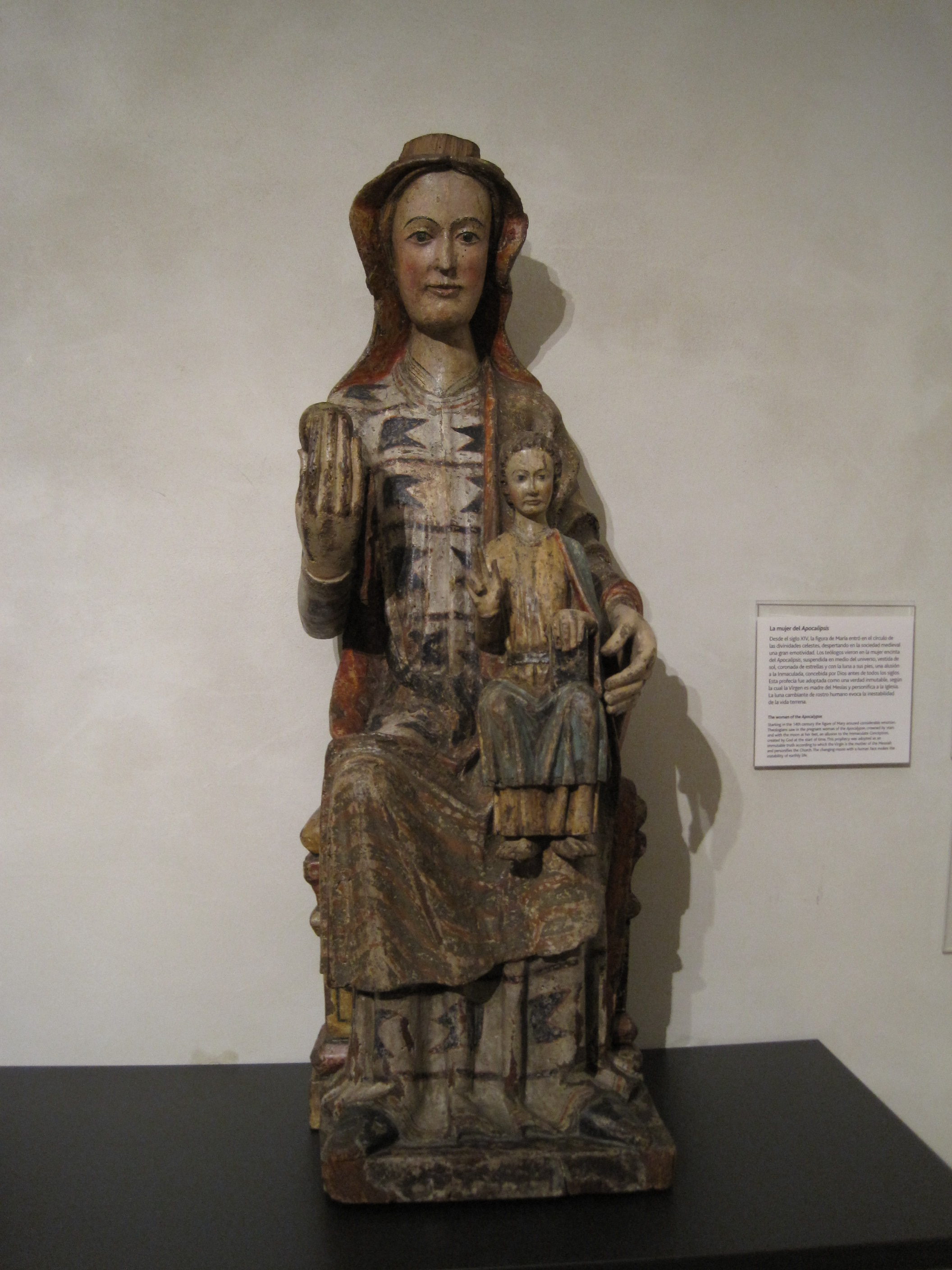 La Virgen con el Niño (finales del siglo XIII), obra de un anónimo castellano. Museo Nacional Colegio de San Gregorio, Valladolid (España).